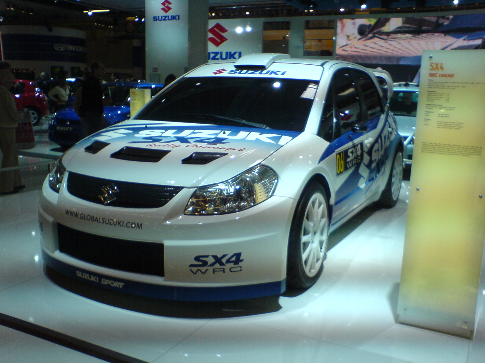 Photo de la Suzuki SX4 prise par GôTô au mondial de l'automobile de Paris 2006